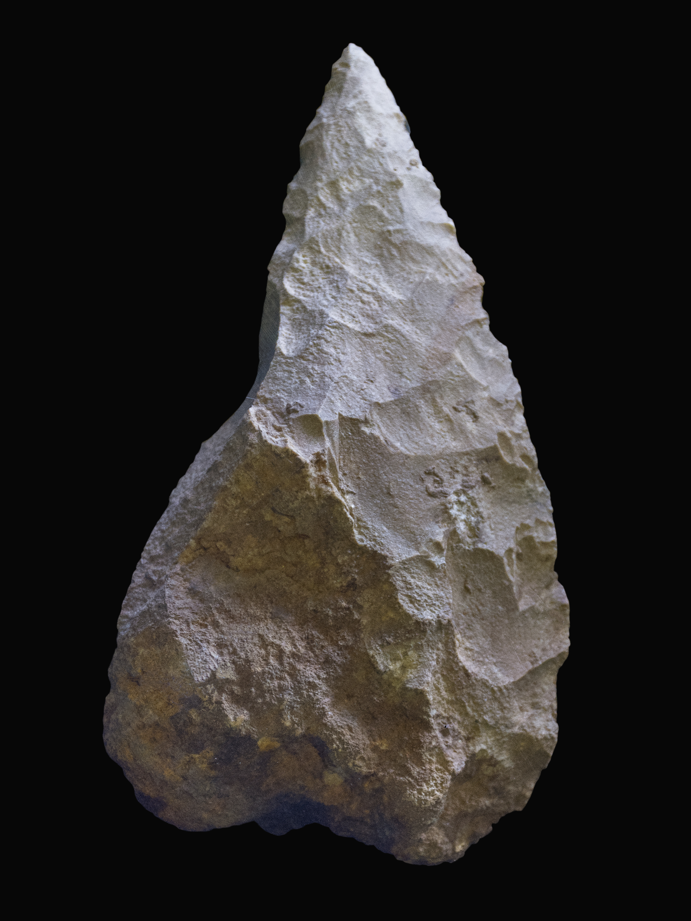 Großes Bocksteinmesser aus der Bocksteinschmiede im Lonetal. Höhe 140 mm, Breite 74 mm, Dicke 30 mm. Robert Wetzel, "Die Bocksteinschmiede im Lonetal" 1958, S. 137 "Typisches Bocksteinmesser, einseitig für linkshändigen Gebrauch gearbeitet, Spitze zweischneidig, Basis roh zugehauen, "Rücken" des Messers zum Anlegen des führenden Zeigefingers geeignet. Nr. 2482, Hauptkultur tief bei + 3.40 S dicht paramedian, Nordostrand der Schmiedsgrube am 2.9.1933. Gez. R. W. Wetzel 1954a, S. 122." Original, Museum Monrepos, Neuwied.